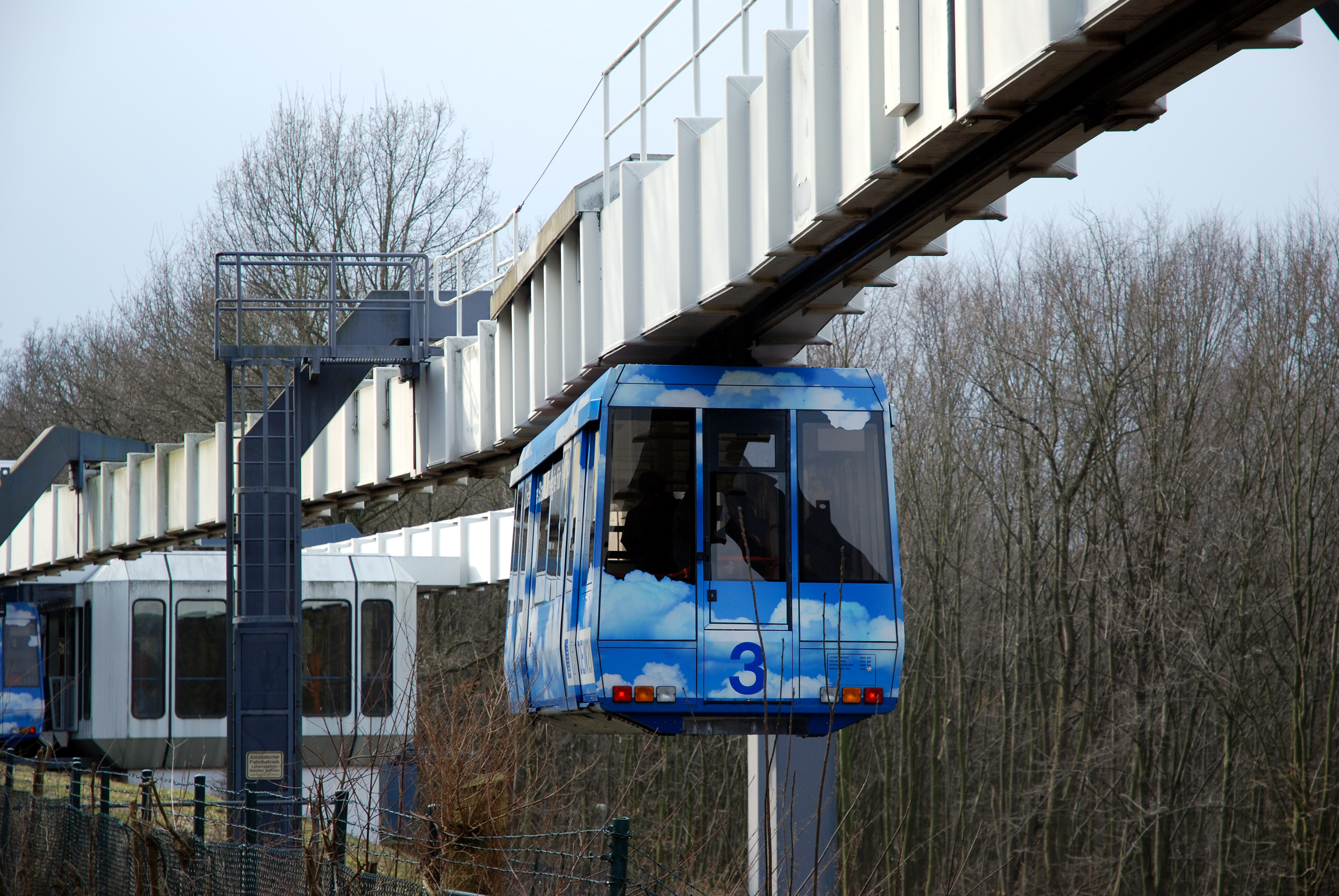 Dortmund-Eichlinghofen, TU Dortmund, Campus Süd, H-Bahn